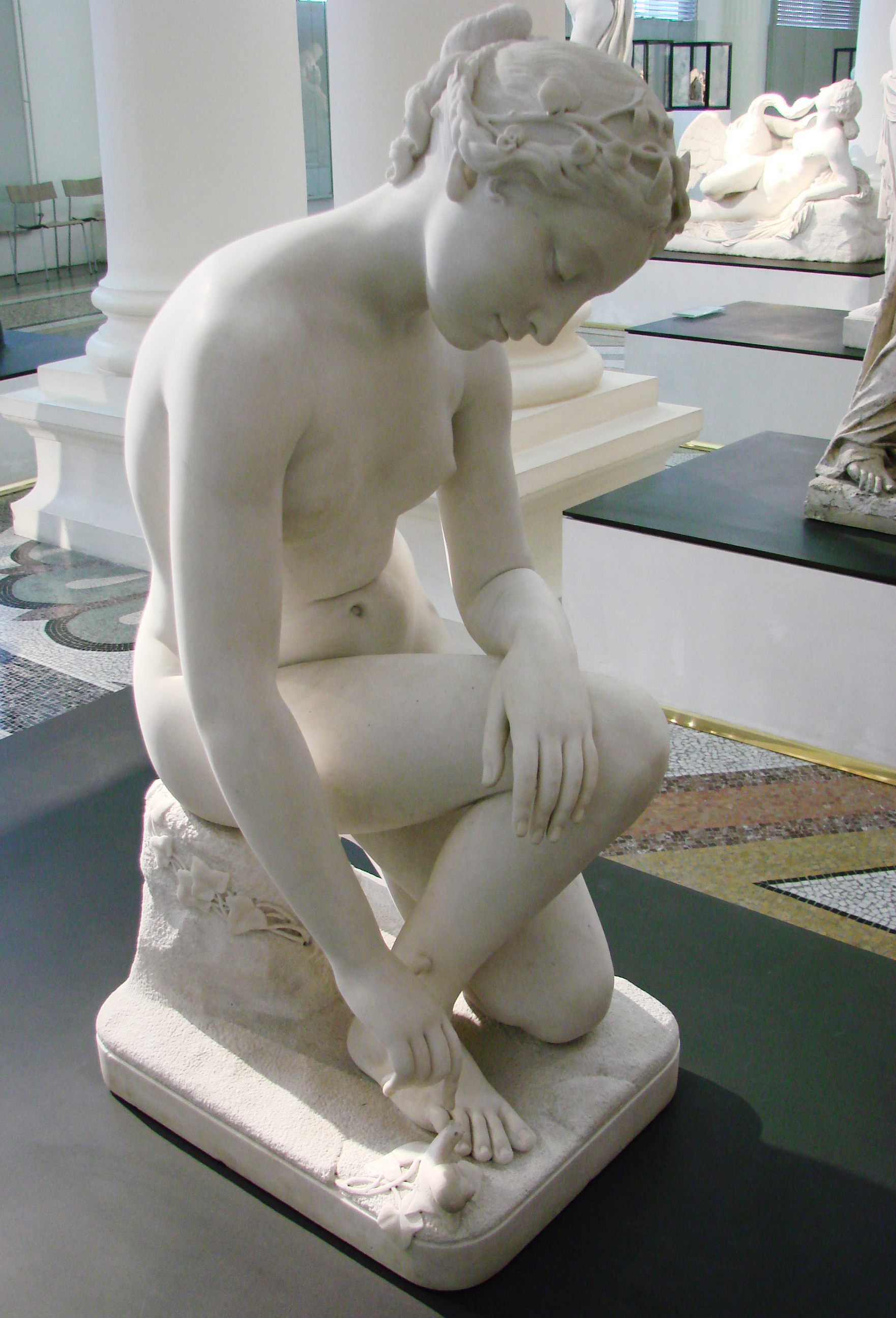 L'Ingénue ou la jeune fille au limaçon, 1843, par Louis Desprez (1799-1870). Musée de Picardie à Amiens.